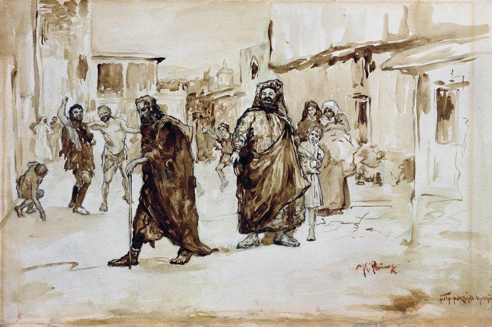 Illustration de Répine pour le Prophète de Lermontov (1890/